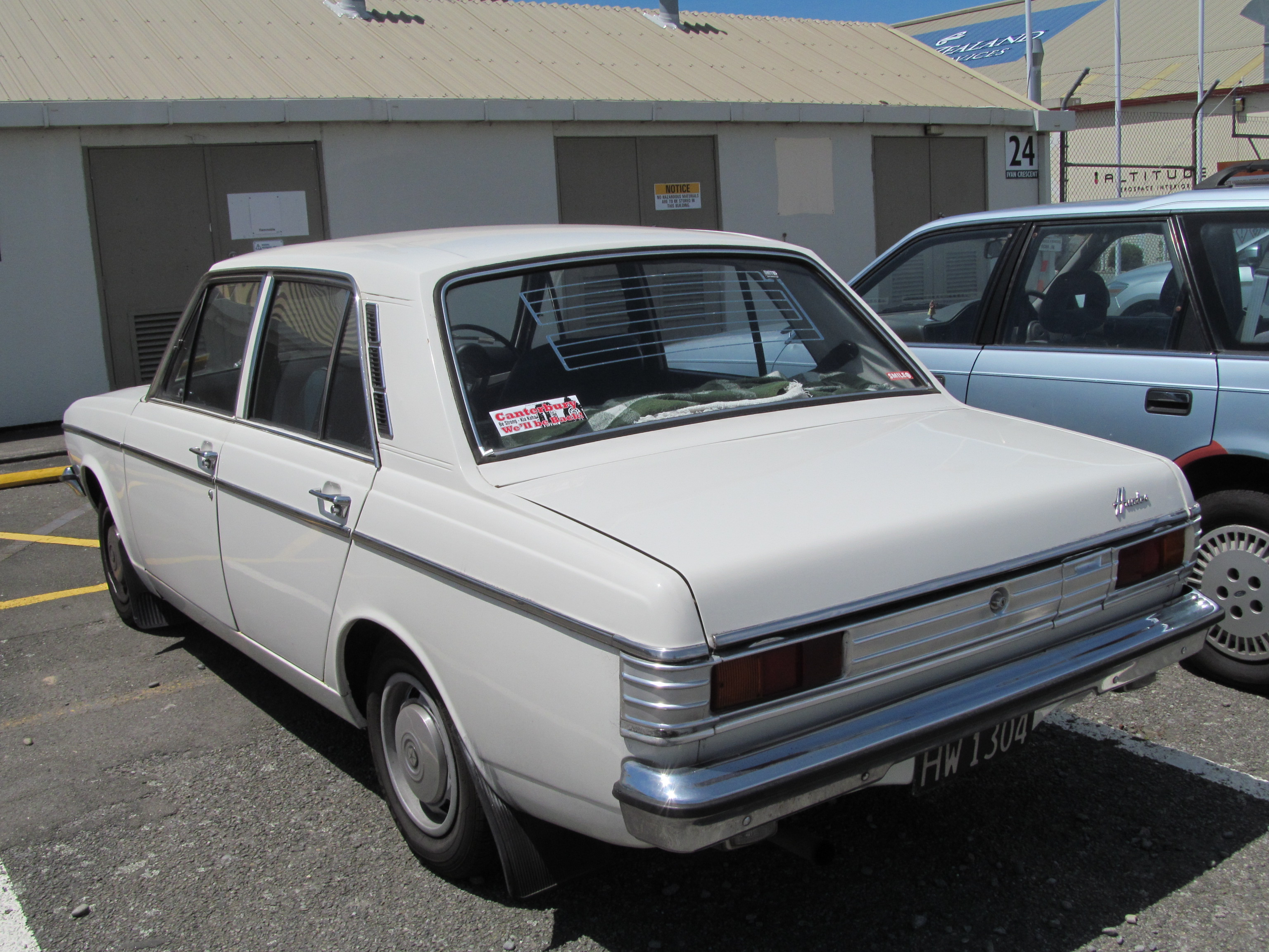 1976 Hillman Hunter Super